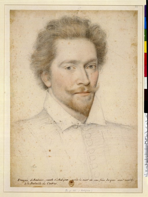 Portrait of François d'Amboise, jeune comte d'Aubijoux.